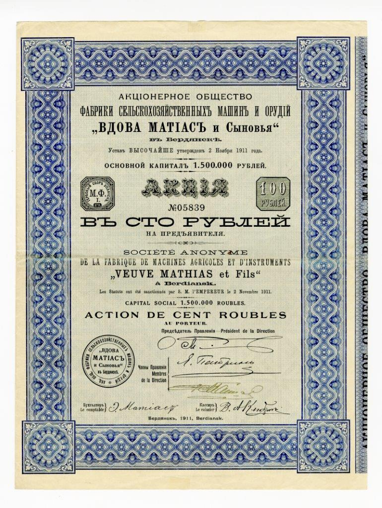 Акция в 100 руб. на предъявителя Акционерного общества фабрики сельскохозяйственных машин и орудий "Вдова Матиас и сыновья" в Бердянске с основным капиталом 1,5 руб. Г. Бердянск, 1911 г.